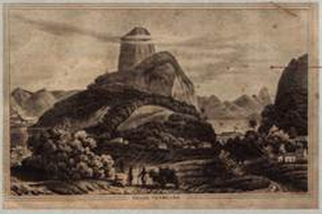 Rio de janeiro periodo colonial